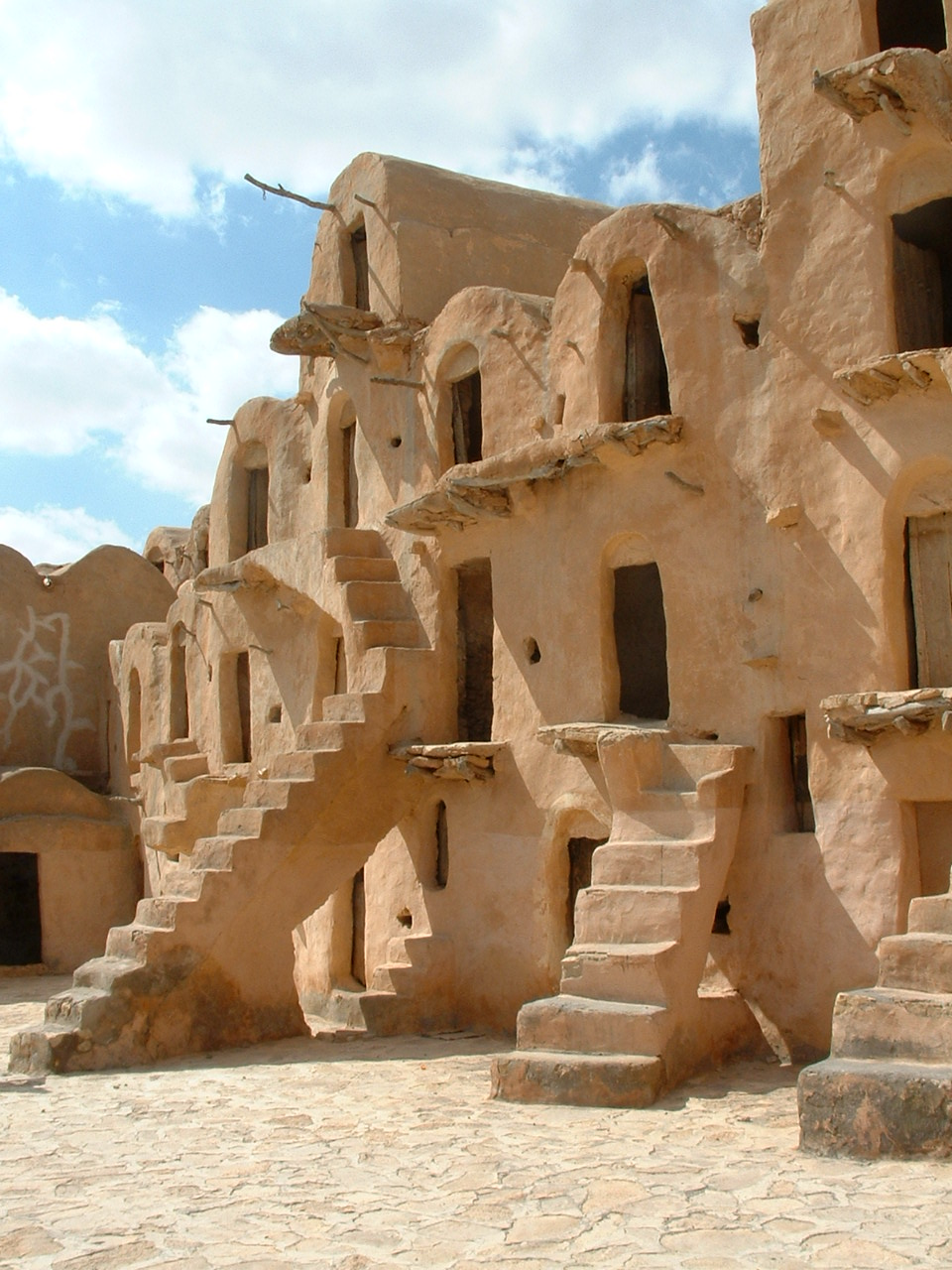 Ksar Ouled Soltane en Tunisie